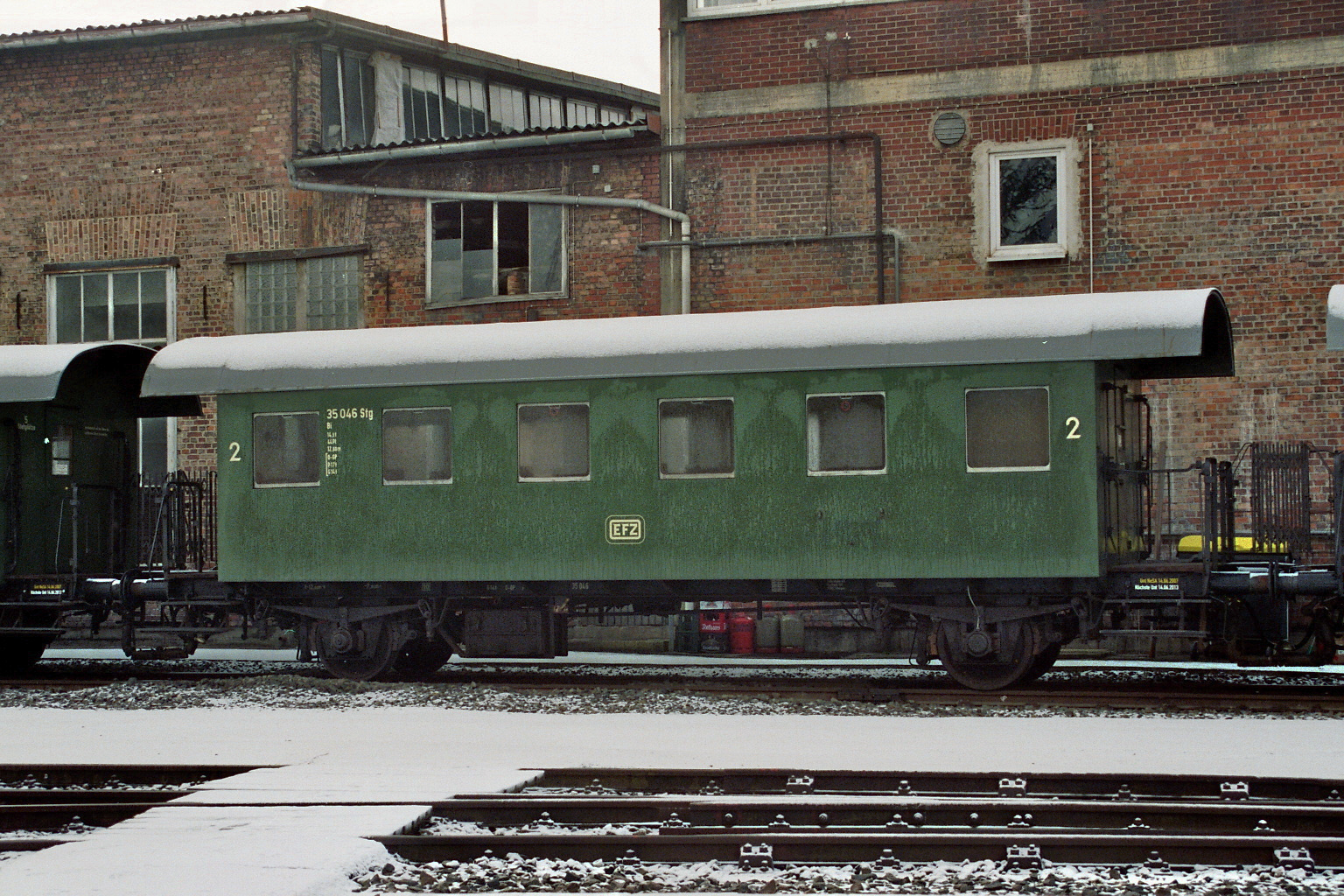 Spantenwagen der EFZ, dem Süddeutschen Eisenbahnmusem Heilbronn leihweise überlassen